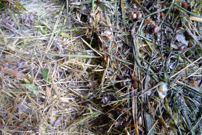 Grasschnitt, der mehrere Tage bei Dauerregen im Freien lag, ist aufgrund der Kompostierungswärme nur an der Oberfläche nass